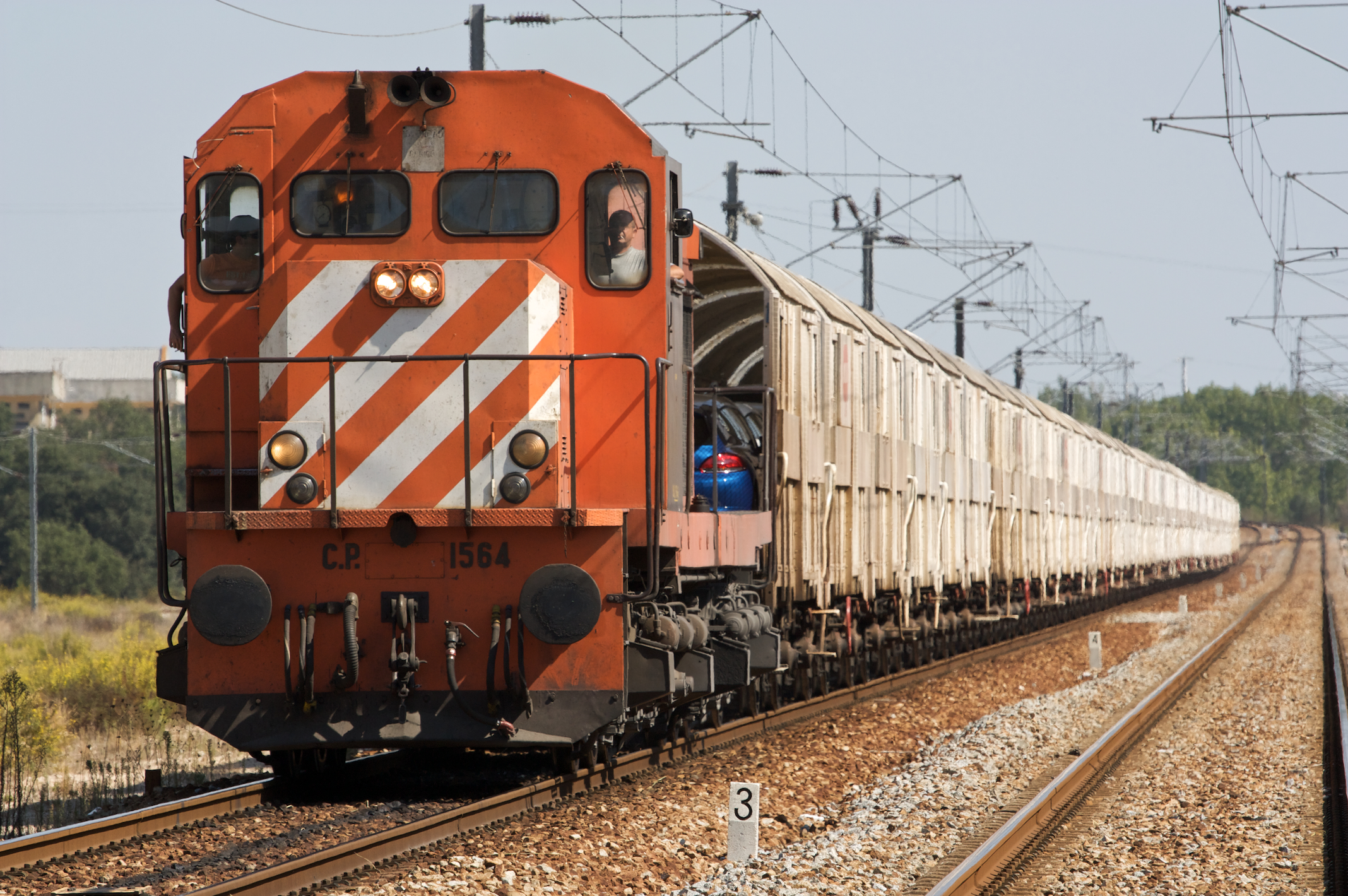 Tipo: Comboio de Transporte de Automóveis 69803 [Penalva - Setúbal • Mar] Local: Estação de Águas de Moura [Concordância de Águas de Moura, PK 44] Data e hora: 25 de Setembro de 2009 [12h26] Material: Locomotiva 1564 + 18 vagões CP Hccerrs